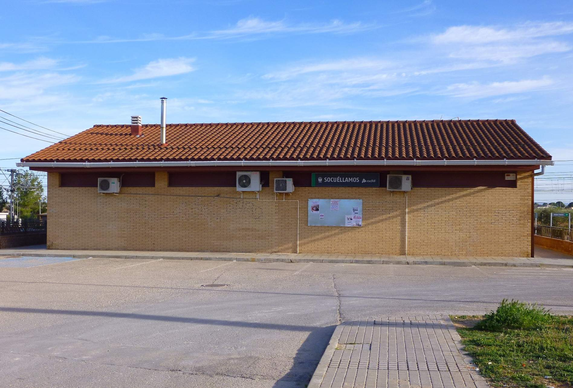 Nueva estación de tren de Socuéllamos